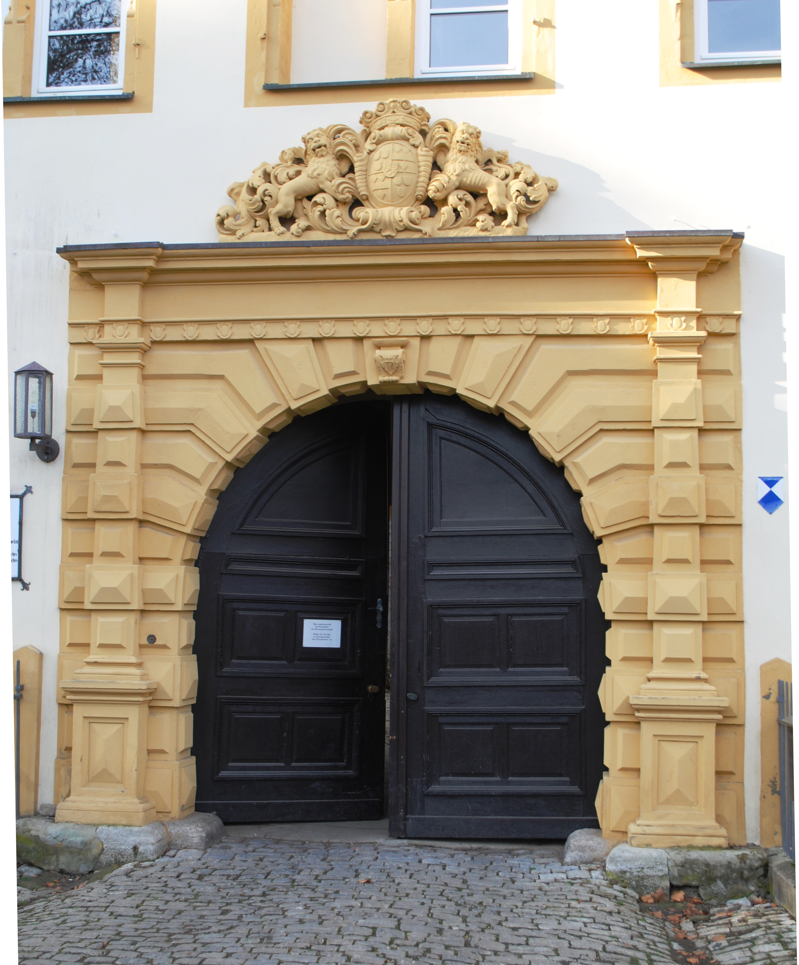 Portal, Schloss Gaibach